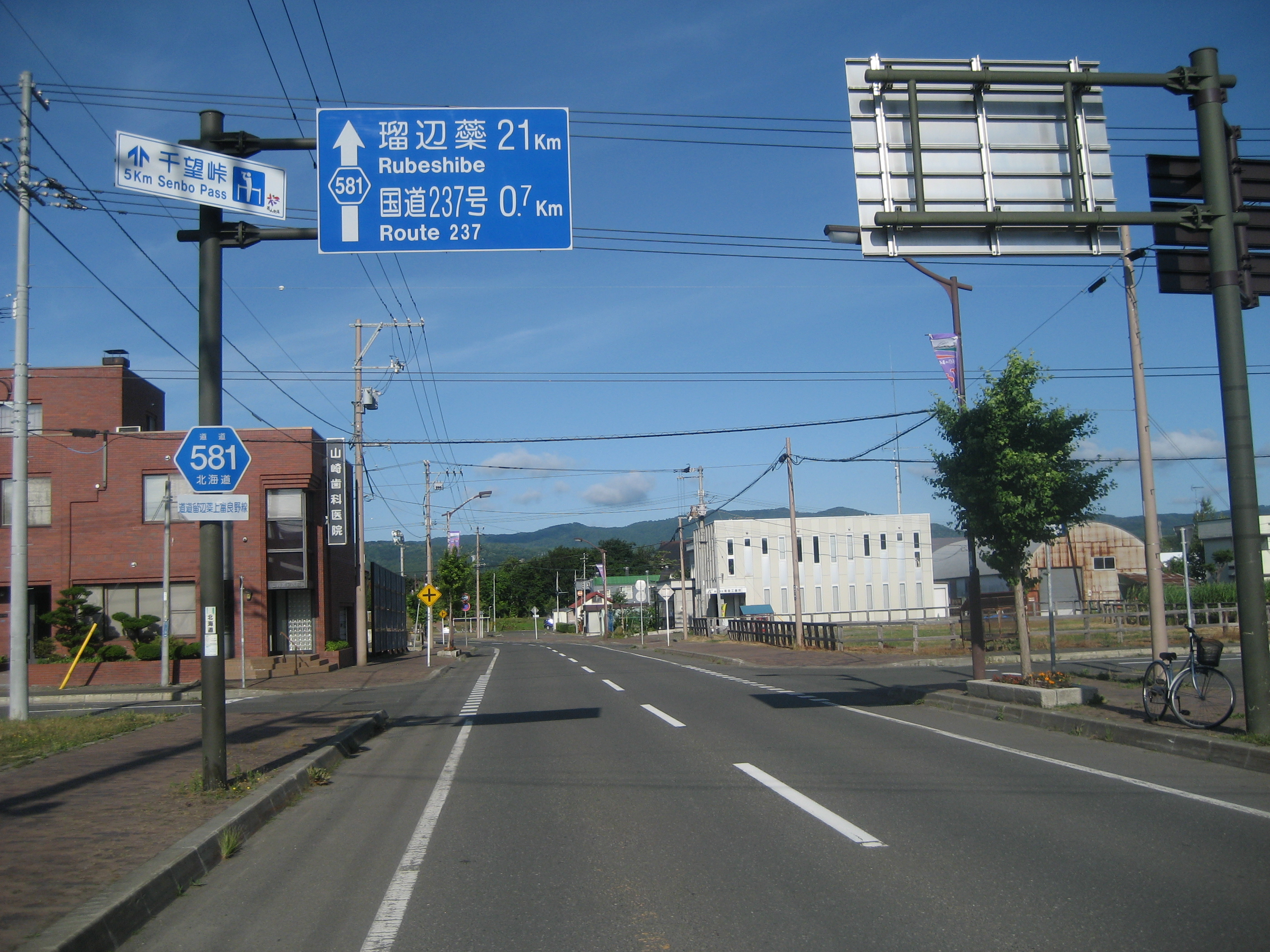 道道581号線上富良野町中町2丁目付近